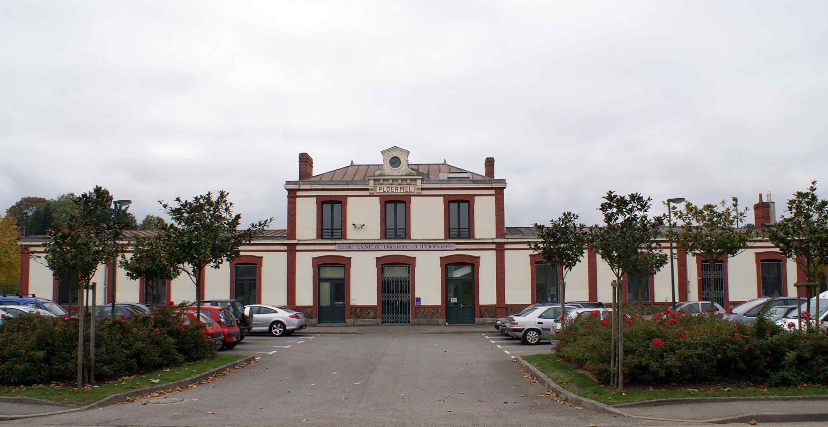 Façade extérieure du bâtiment voyageur de la gare de Ploërmel, devenu centre de formation.